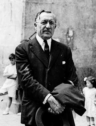 Azpeitia. 1934. El diputado Monzon, el alcalde de Azpeitia y Ramiro Maestu presidiento la procesión de S. Ignacio. Localización: Azpeitia